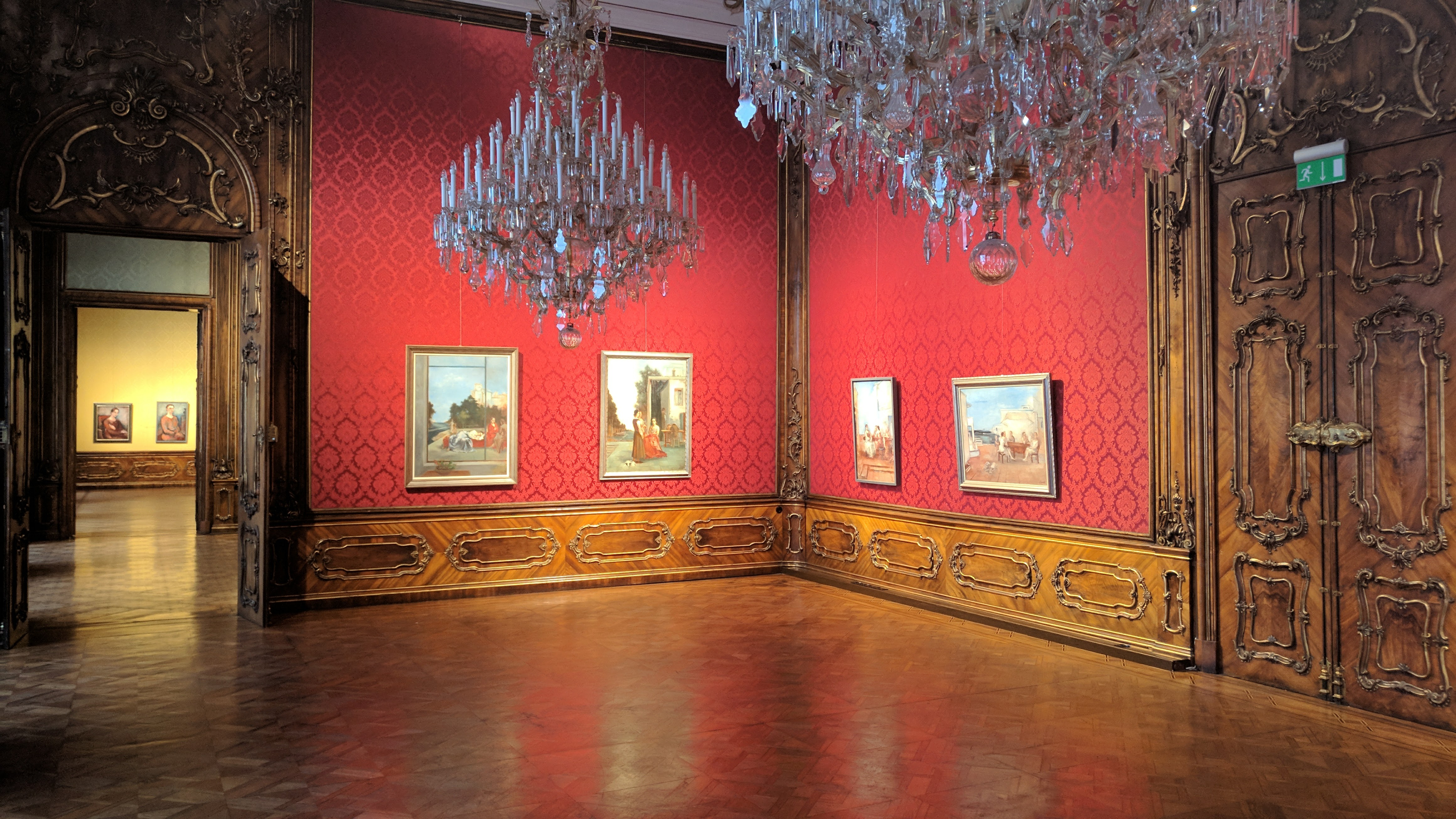 Innenansicht W&K Palais Schönborn-Batthyány mit der Ausstellung Josef Floch - Wien - Paris - New York